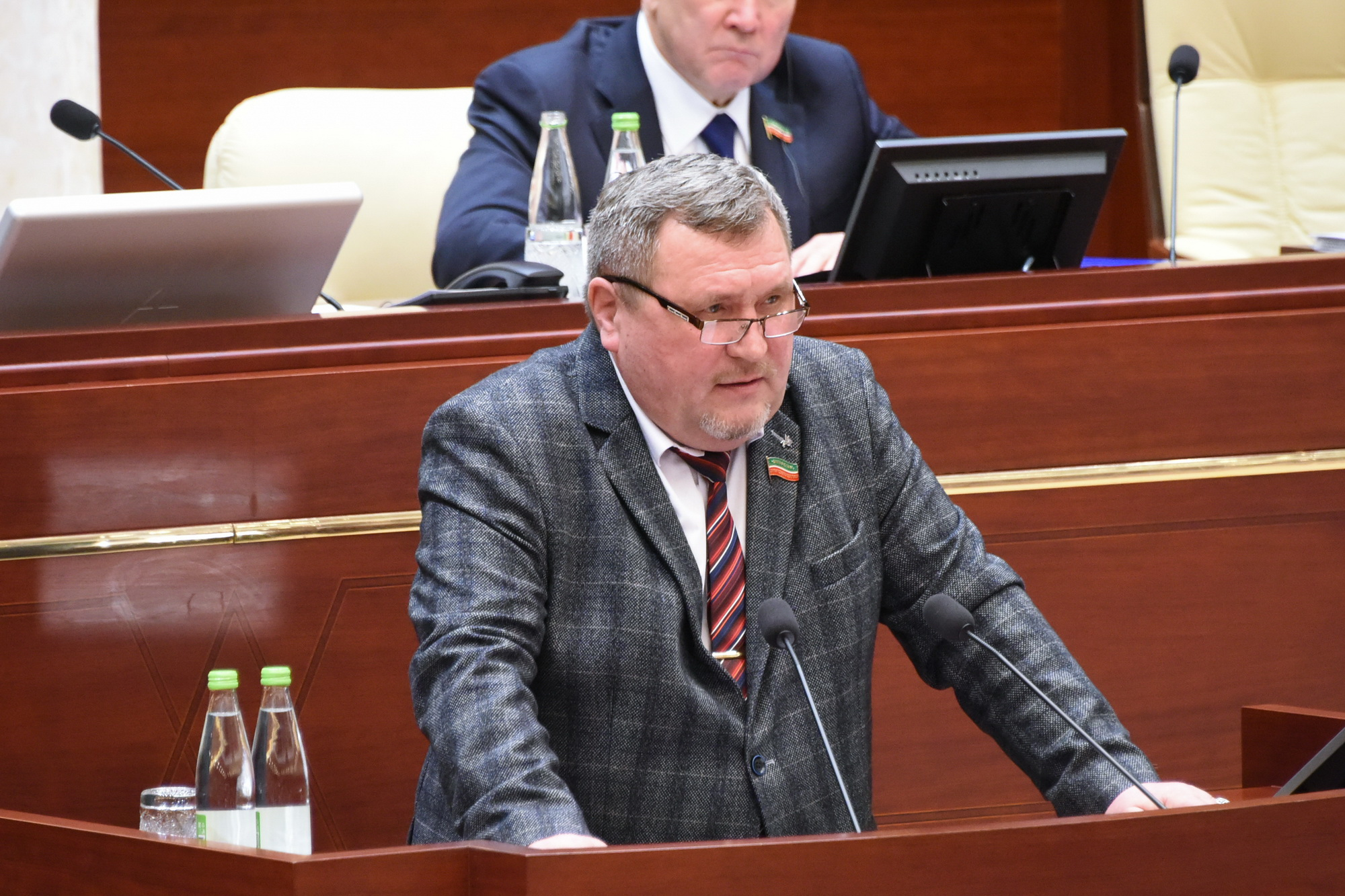 Восьмое заседание Государственного Совета Республики Татарстан шестого созыва. Выступает депутат Ркаил Зайдуллин.